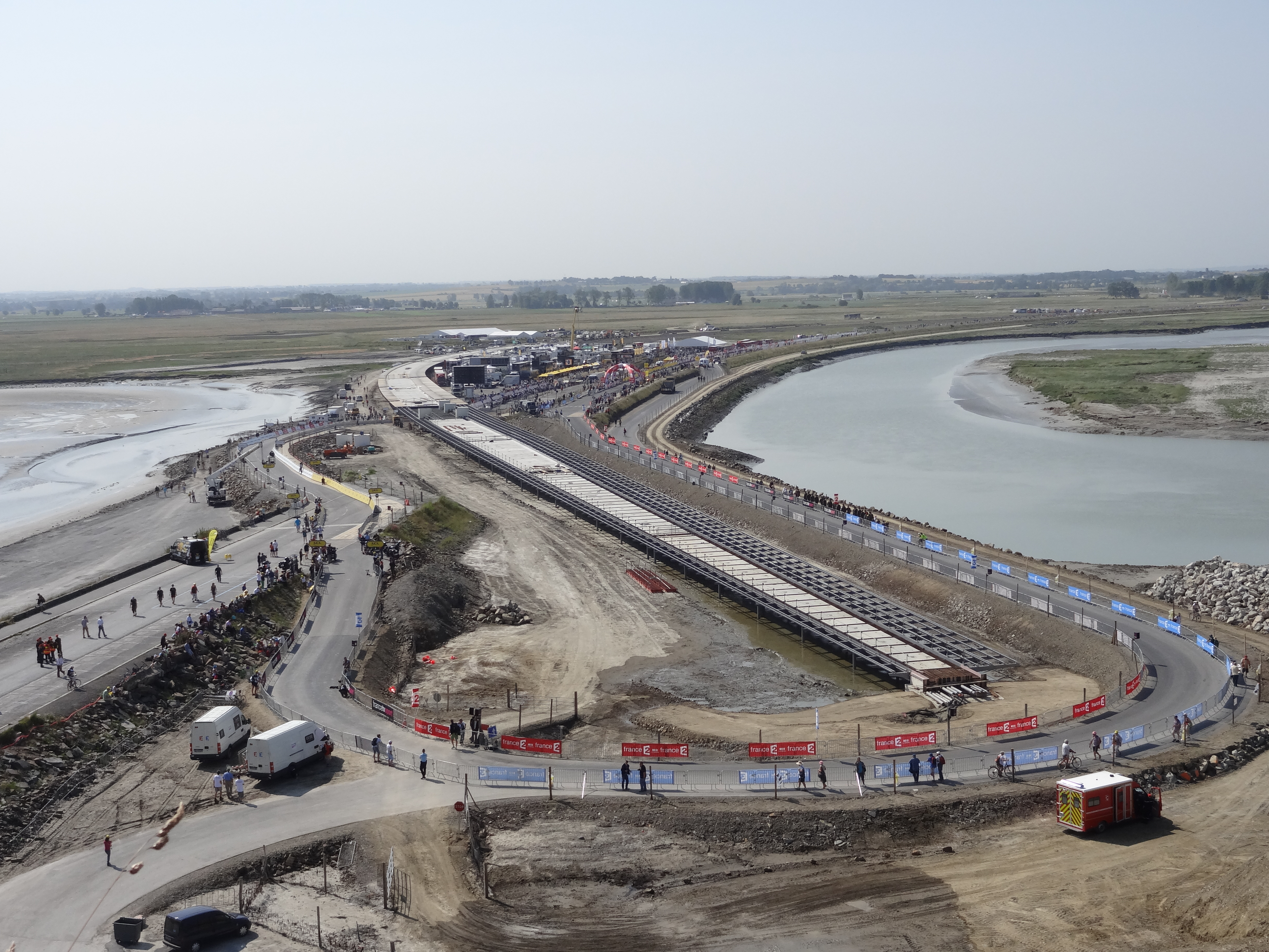 Tour de France 2013. Arrivée de l'étape au Mont Saint-Michel. Vue de la future passerelle permettant l'accès au mont.